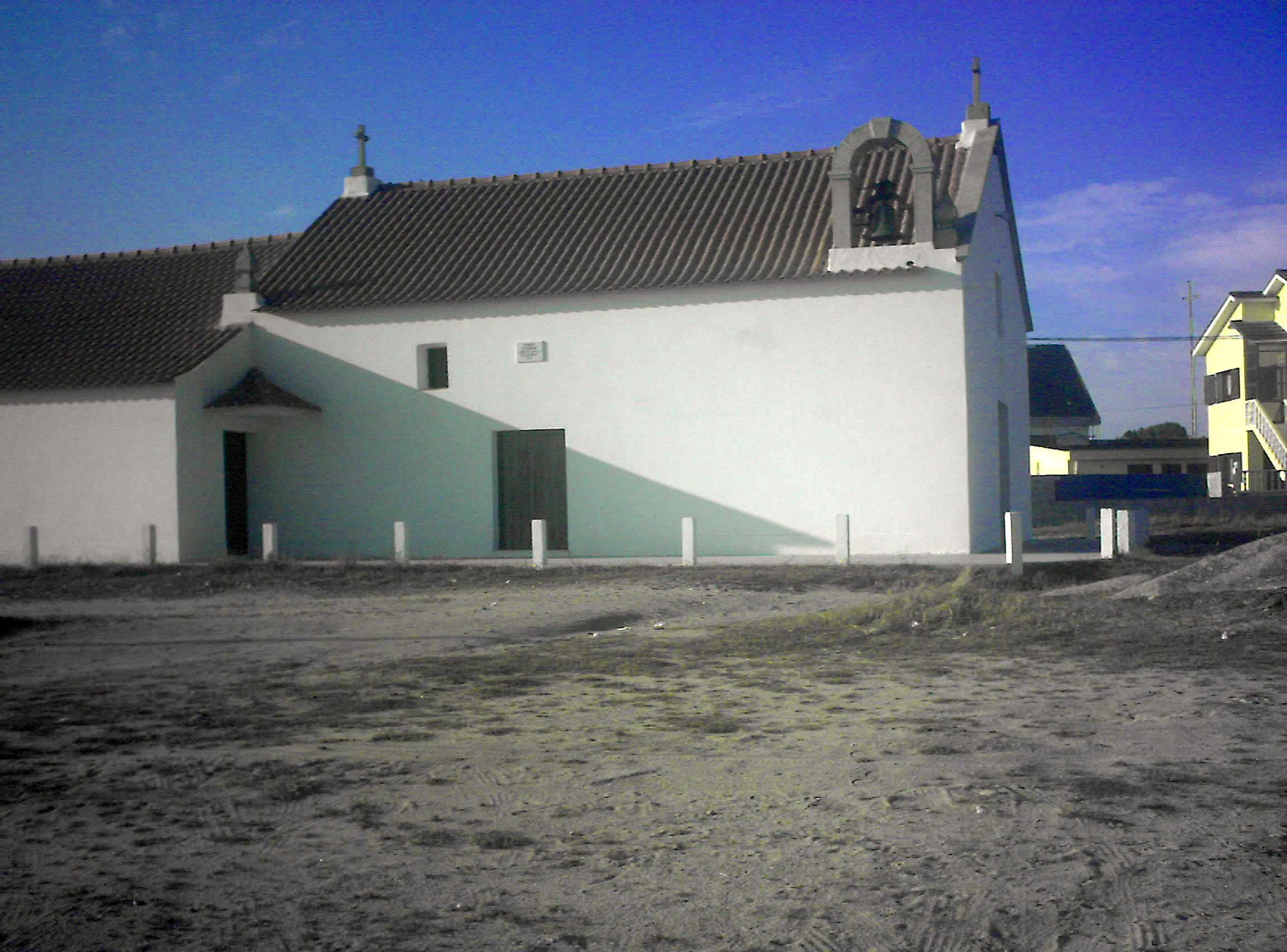 by user:PedroPVZ Capela de Santo André